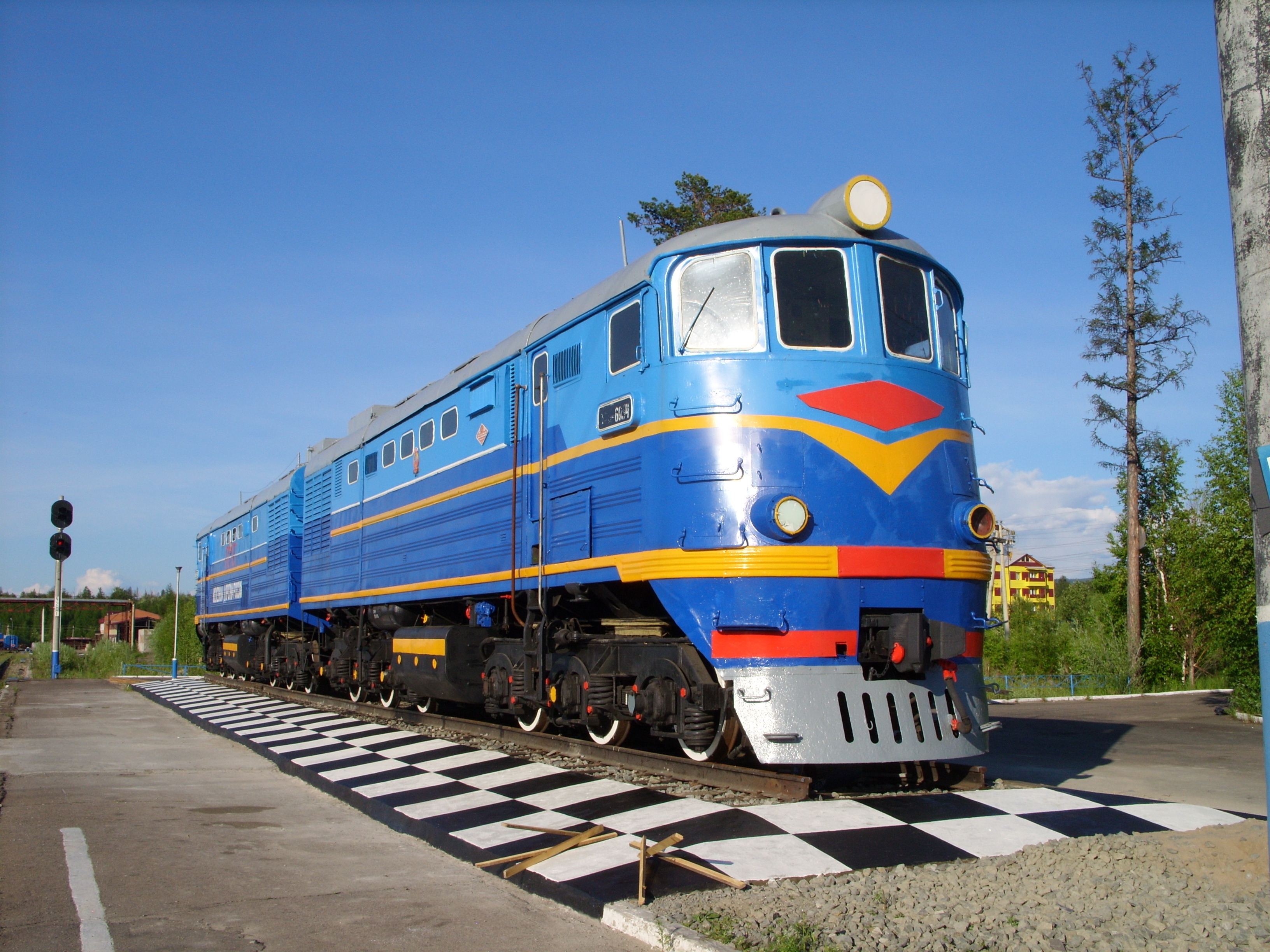 Тепловоз ТЭ3-6034. Новая Чара, Каларский район, Забайкальский край, Россия